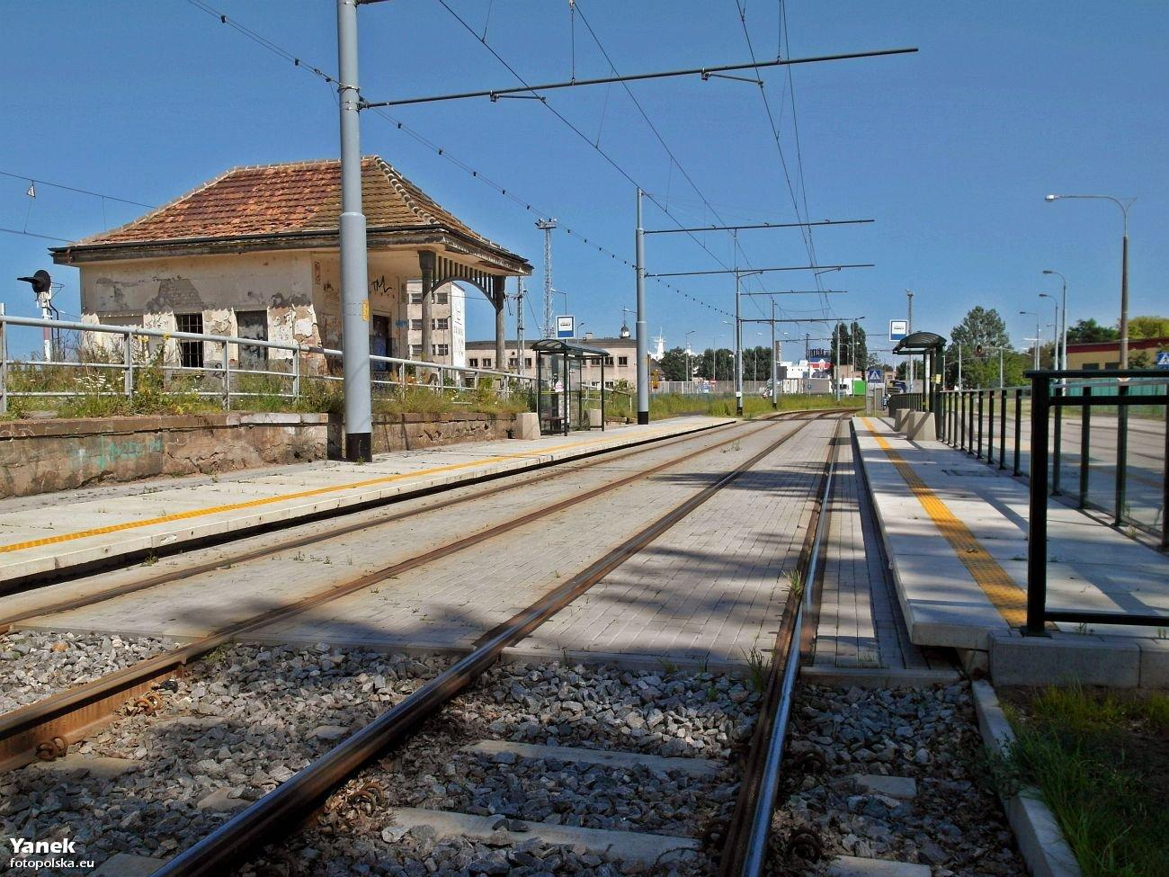 Przystanek tramwajowy "Latarnia Morska", obok nieczynnego przystanku Gdańsk - Brzeźno, przy ul. Oliwskiej.